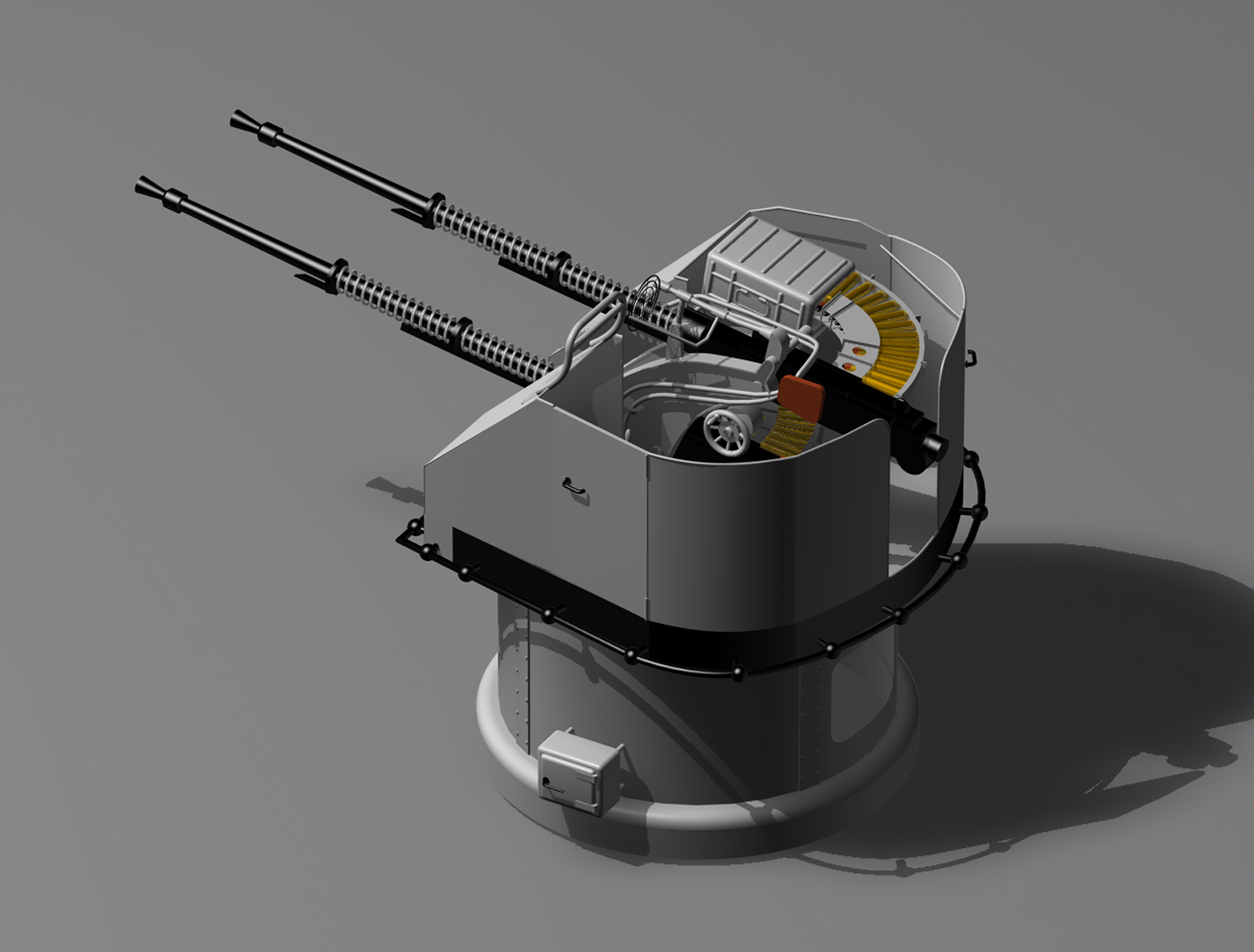 3 D Ansicht des Flugabwehrgeschützes Typ 2M-3